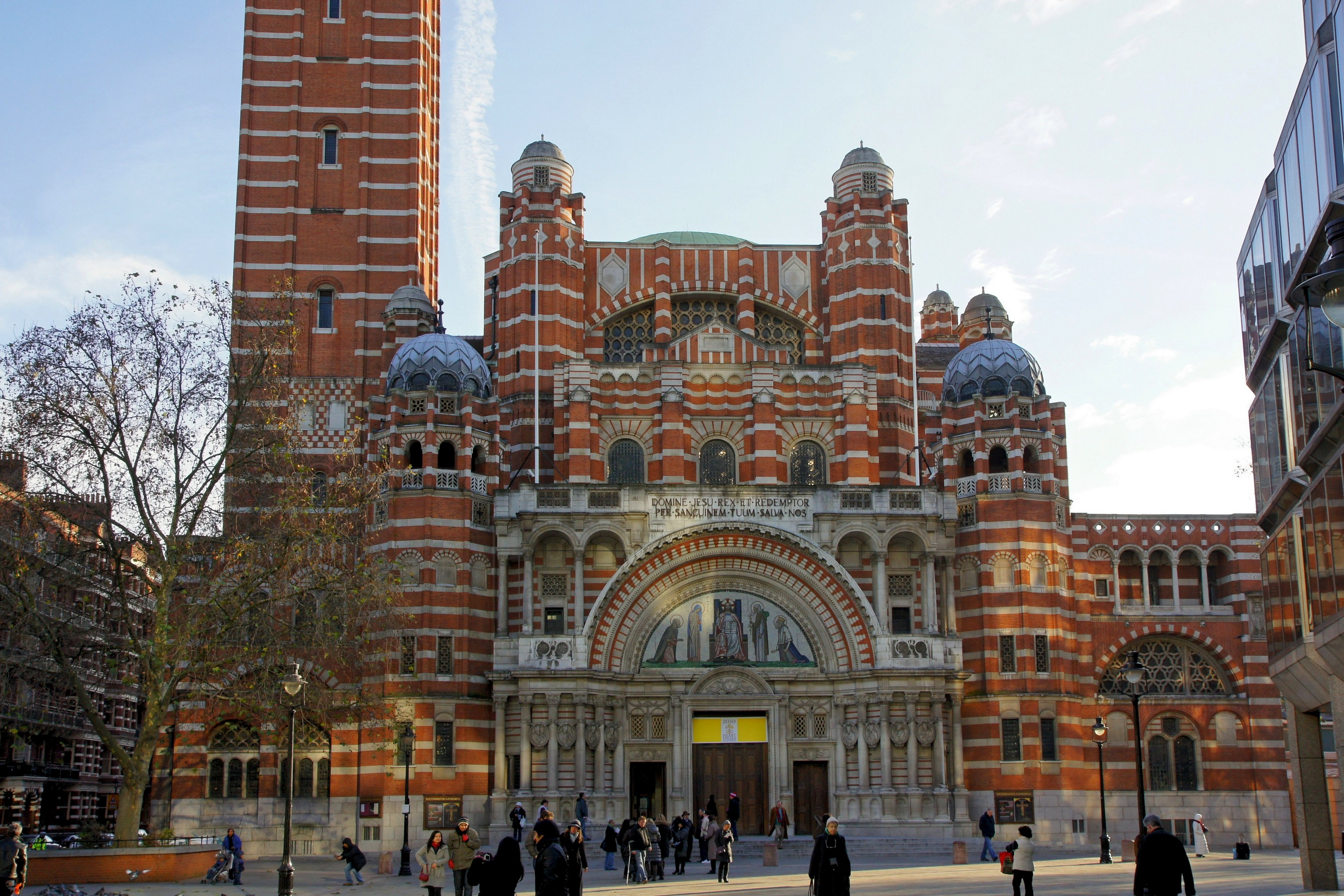 La cathédrale de Westminster à Londres .